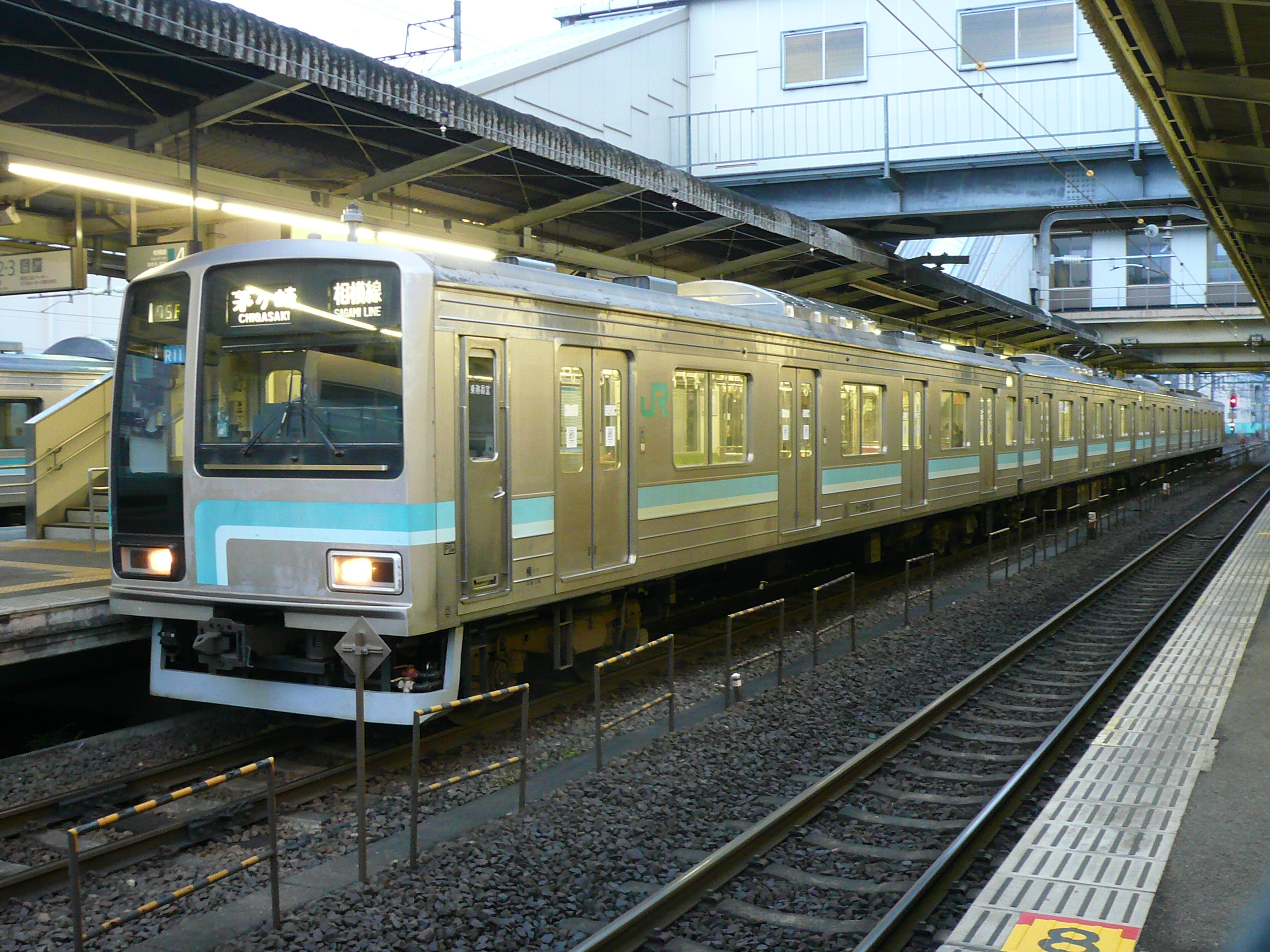 橋本駅撮影